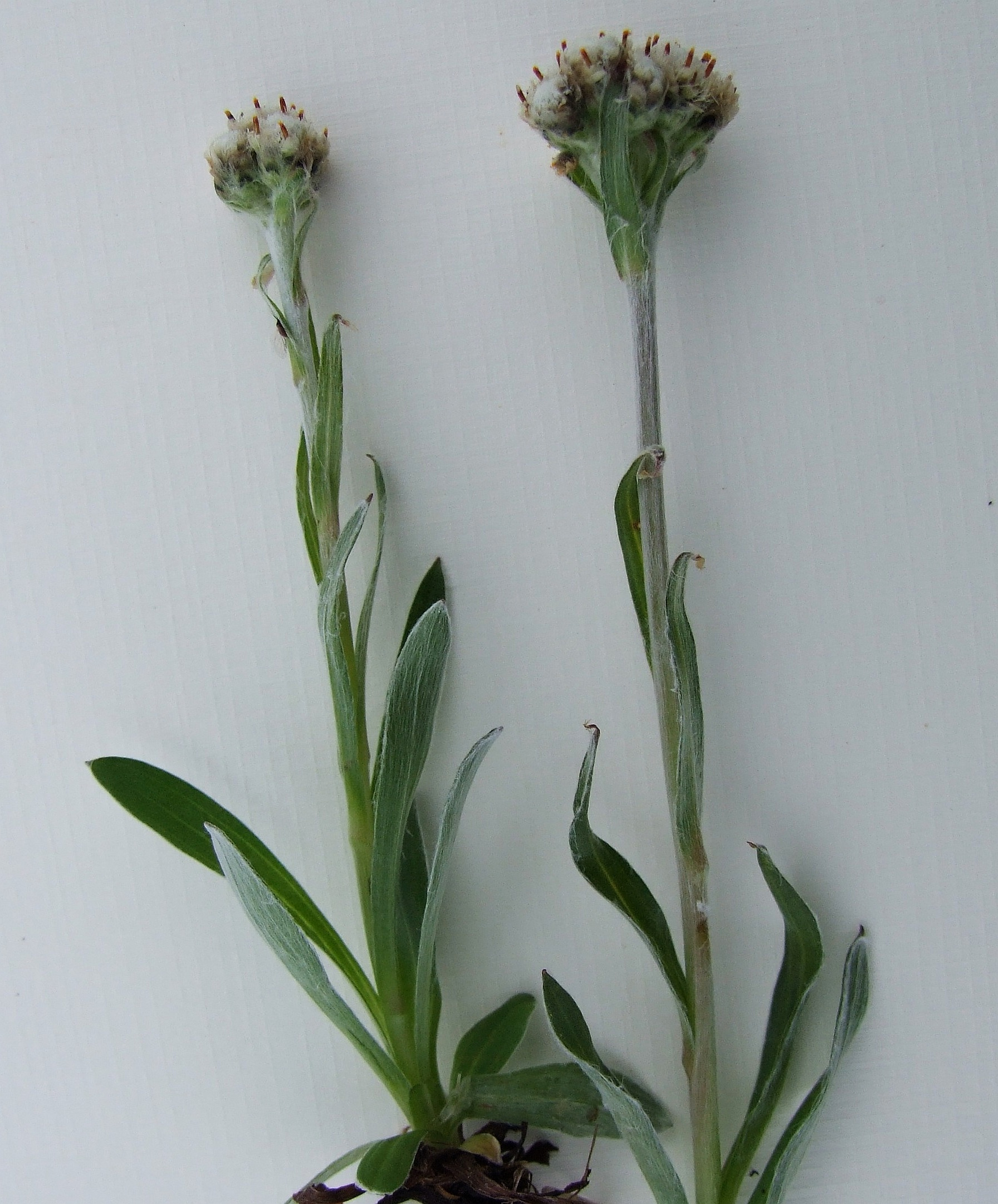 Antennaria carpatica (habitat:Tatra Mountains, Mułowa Przełęcz)